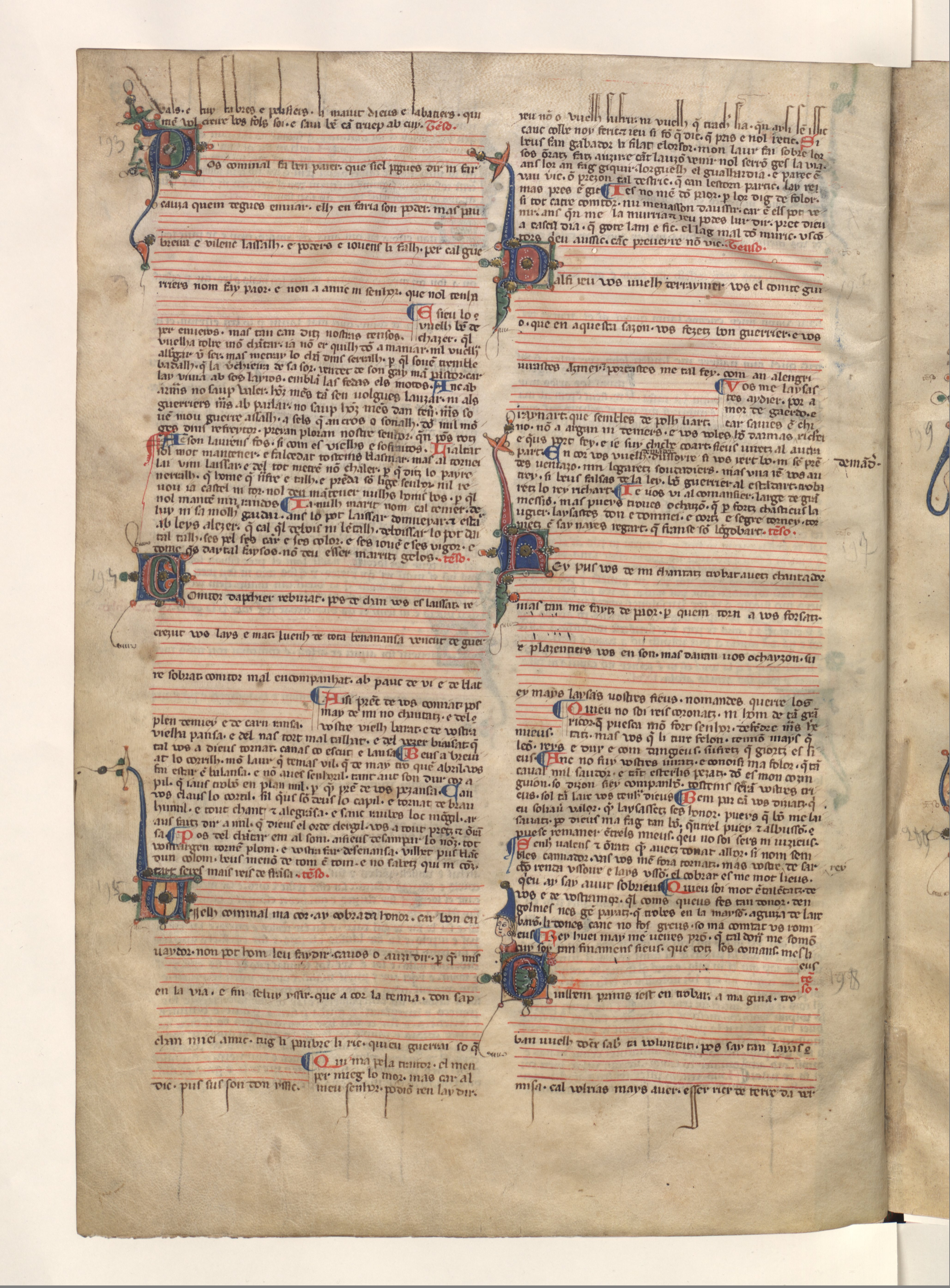 Folio 23v du chansonnier provençal (Chansonnier La Vallière)